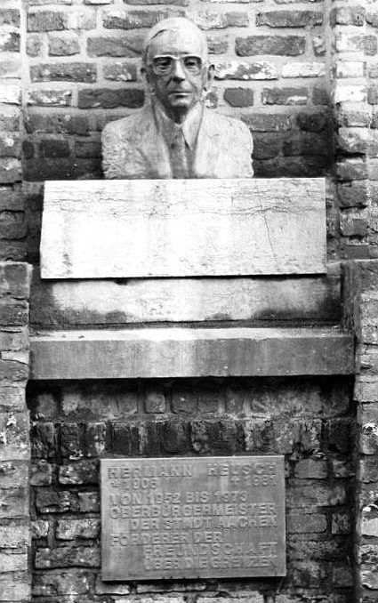 Denkmal Hermann Heusch (1906-1981), Oberbürgermeister von Aachen